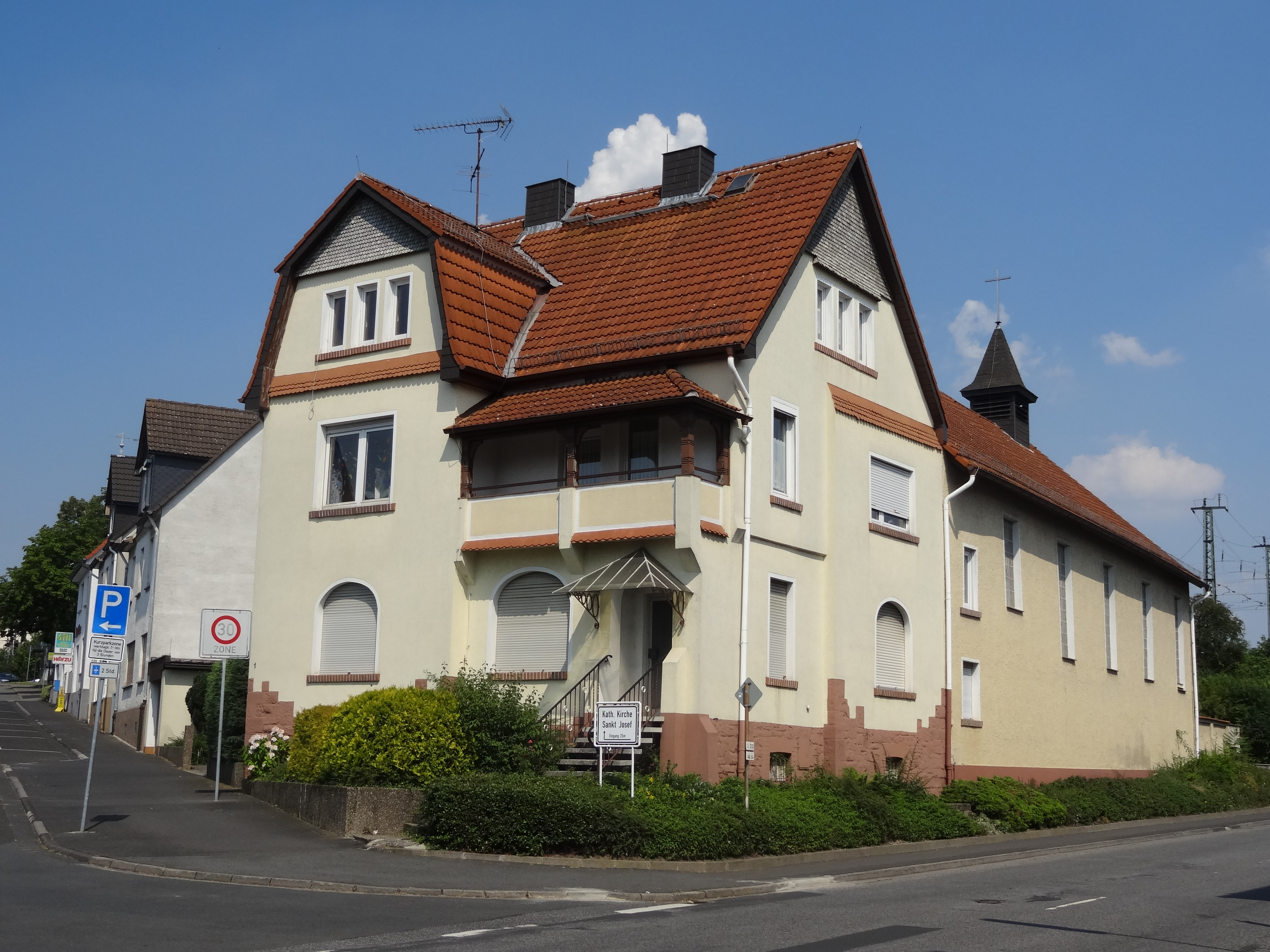 Pfarrhaus und Kirche St. Josef, Bahnhofstraße 1 35428 Langgöns